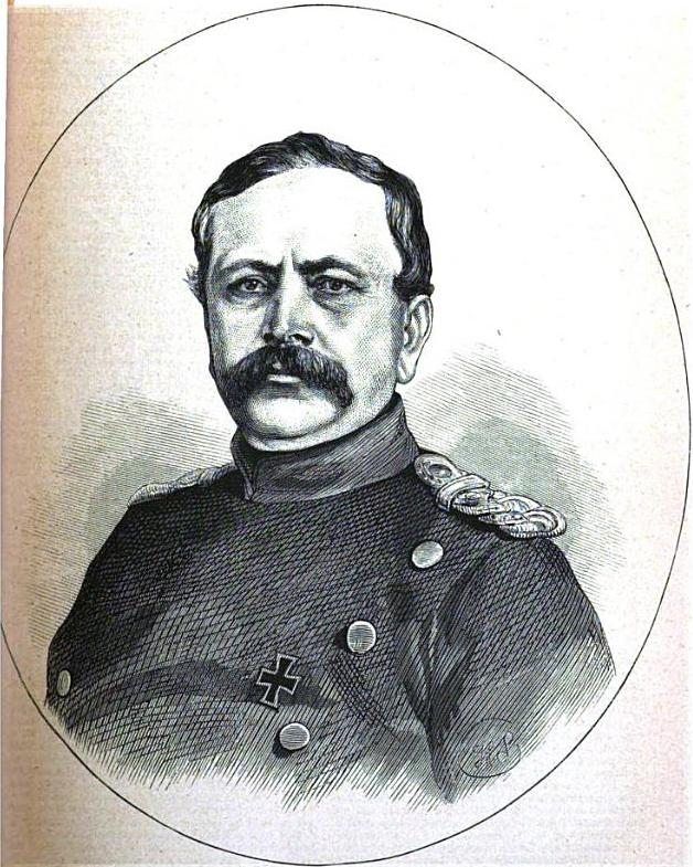 Albrecht von Stosch (* 20. April 1818 in Koblenz; † 29. Februar 1896 in Mittelheim) war als General der Infanterie und Admiral